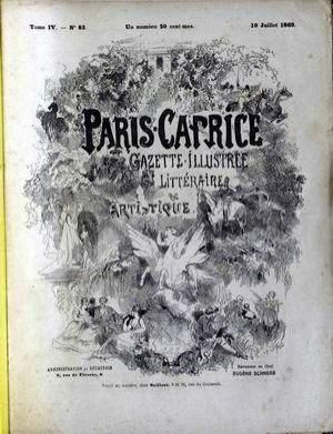 Paris-Caprice, 10 juillet 1869, rédacteur-en-chef Eugène Schnerb - front page